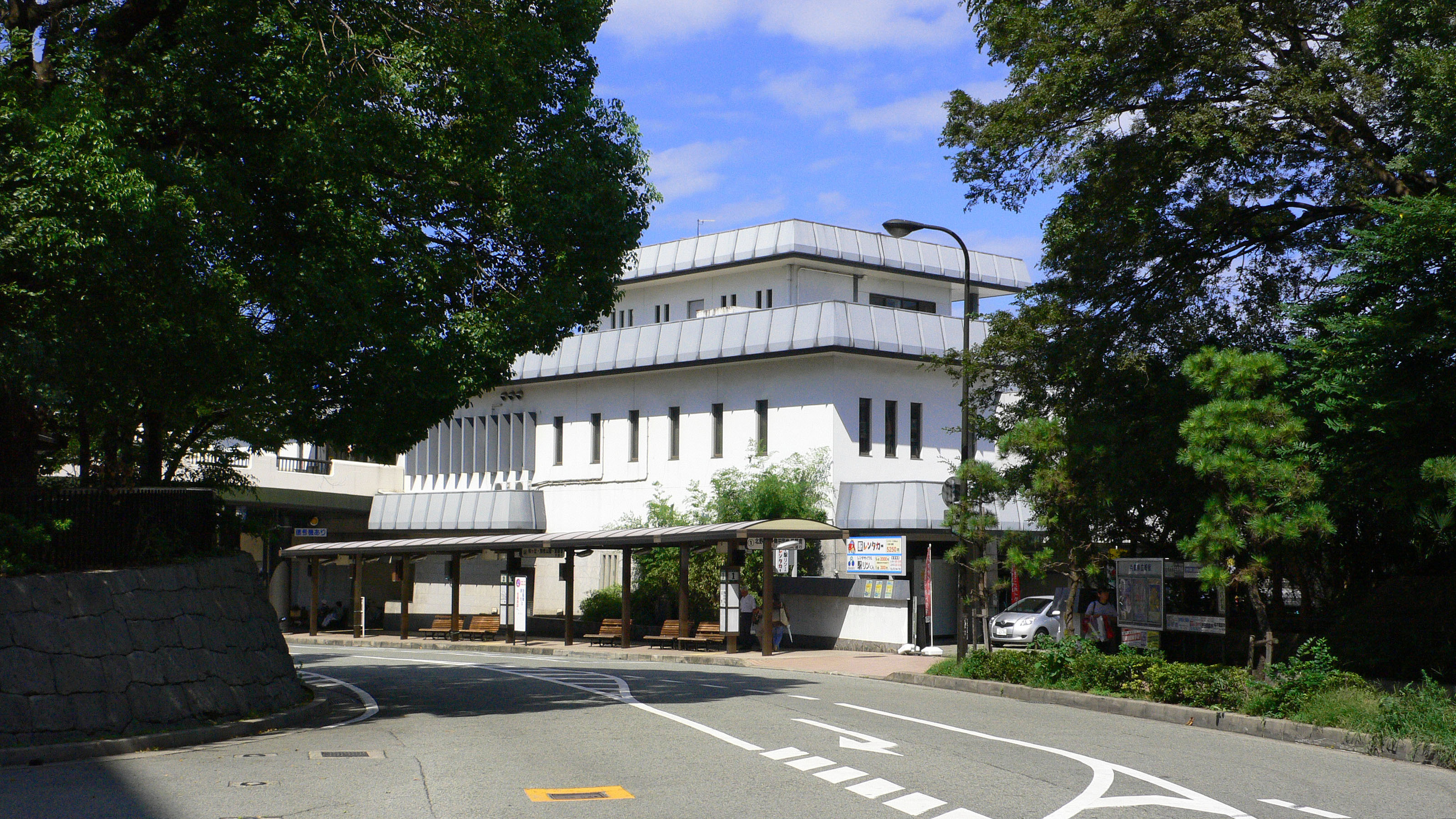 JR Itami Station in Itami, Japan